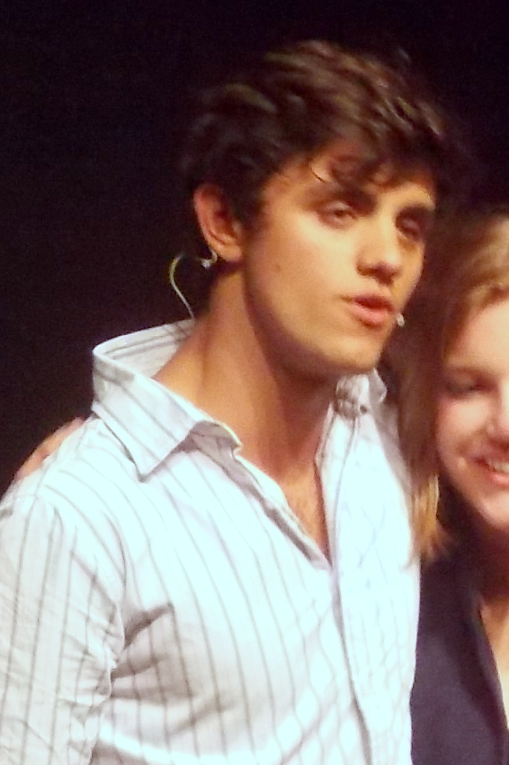 A peça “Conto de Verão” sendo apresentada na Festa Internacional de Teatro de Angra. Elenco: Julia Oristânio, Alice Wegmann, Felipe Simas e João Vithor Oliveira.